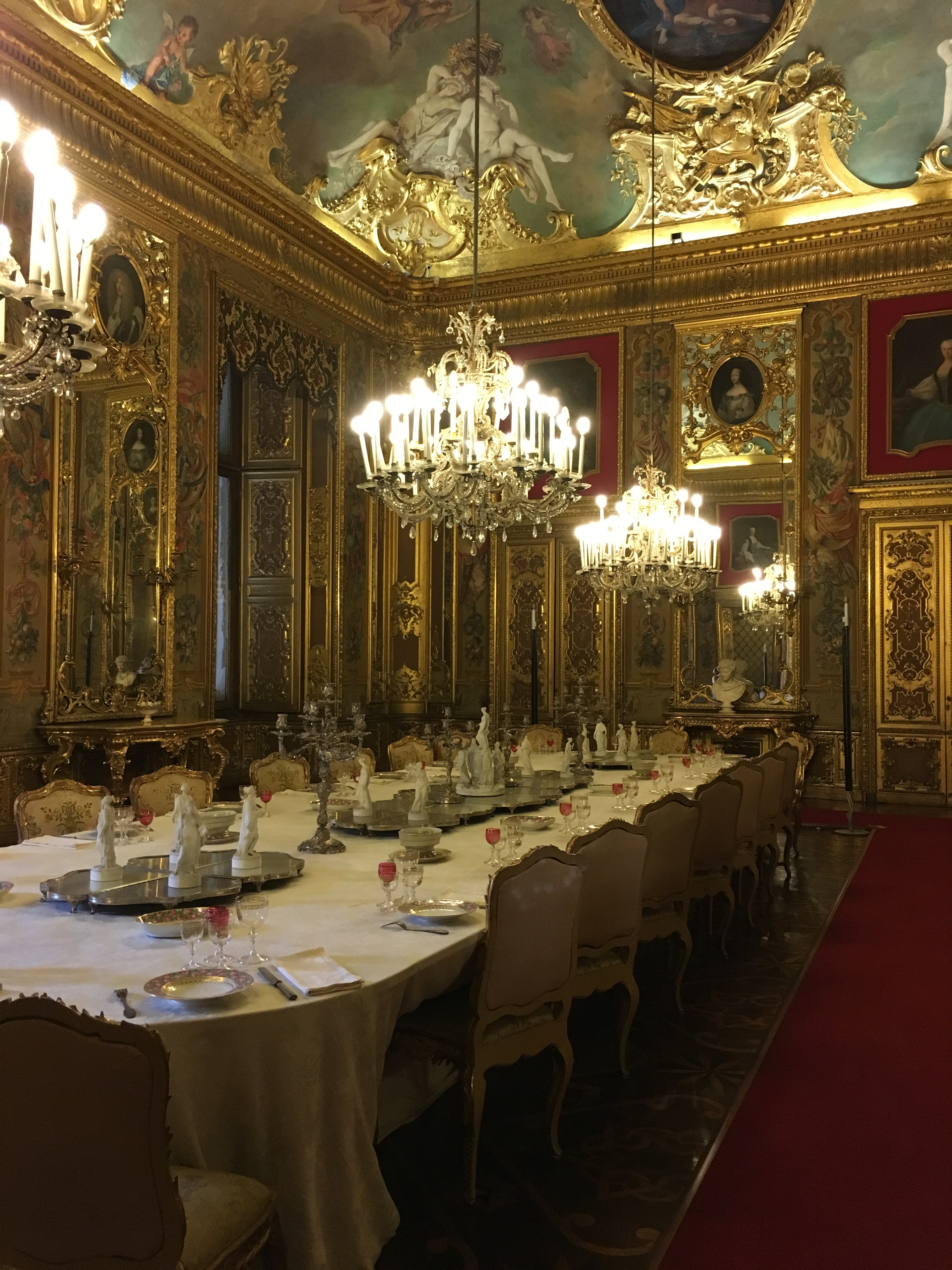 Sala da pranzo. Palazzo reale Torino